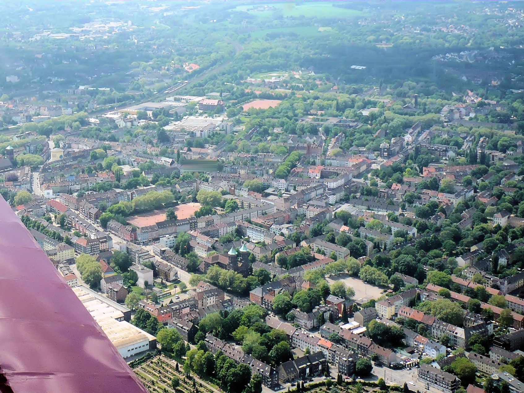 Essen-Altendorf, Blick von Nordosten